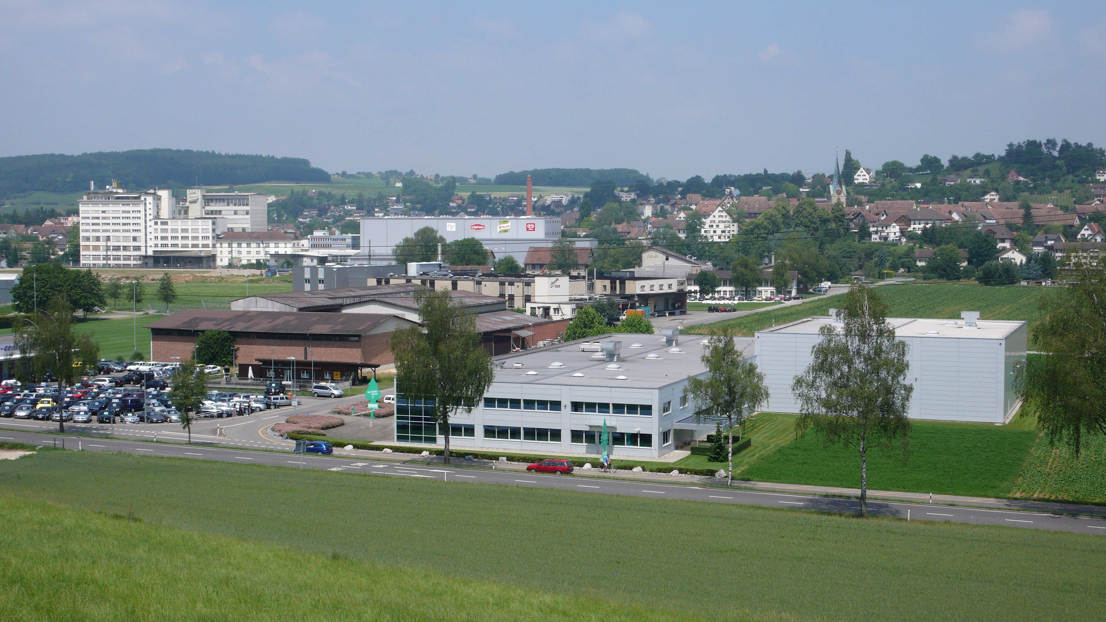 Thayngen, Switzerland